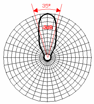 Antenne karakteristiek met openingshoek